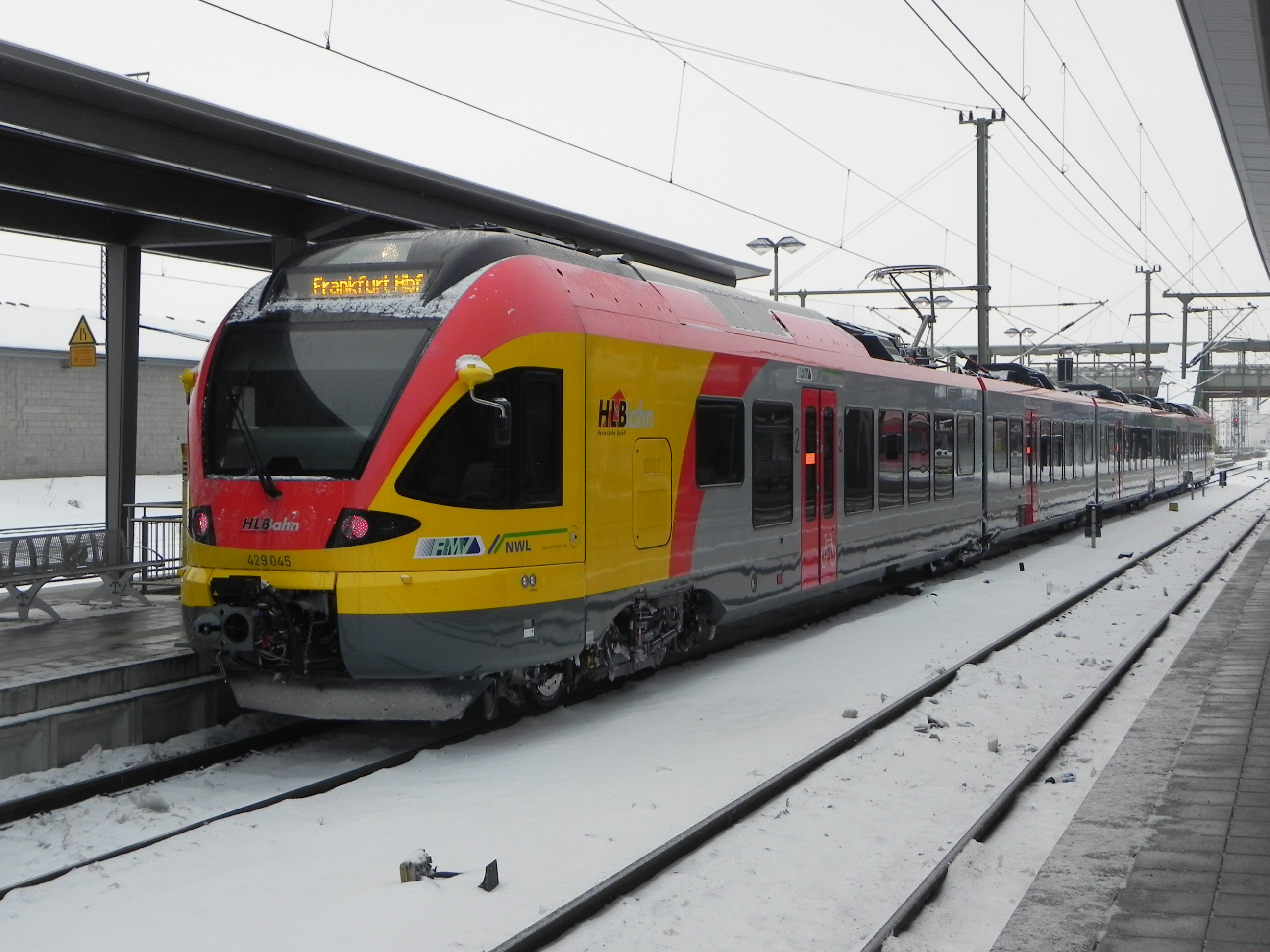 Seit dem Fahrplanwechsel am 12.12.2010 wuchs die Zahl der EVU mit Stadler-FLIRT um zwei. Neben der VIAS kam auch die Hessische Landesbahn hinzu. Hier steht der 429 045 der HLB in Gießen bereit. Einige Minuten später wurde dieser Triebzug mit 429 041 aus Siegen vereint. Zwar betreibt die HLB bereits FLIRTs, dies aber bei der CANTUS. Bei CANTUS gehört die andere Hälfte der Triebzüge der Hamburger Hochbahn. Diese Massnahme war erforderlich, damit, falls die CANTUS bei einer erneuten Ausschreibung den aktuellen Auftrag verliert, die Fahrzeuge ohne Streit aufgeteilt werden können.